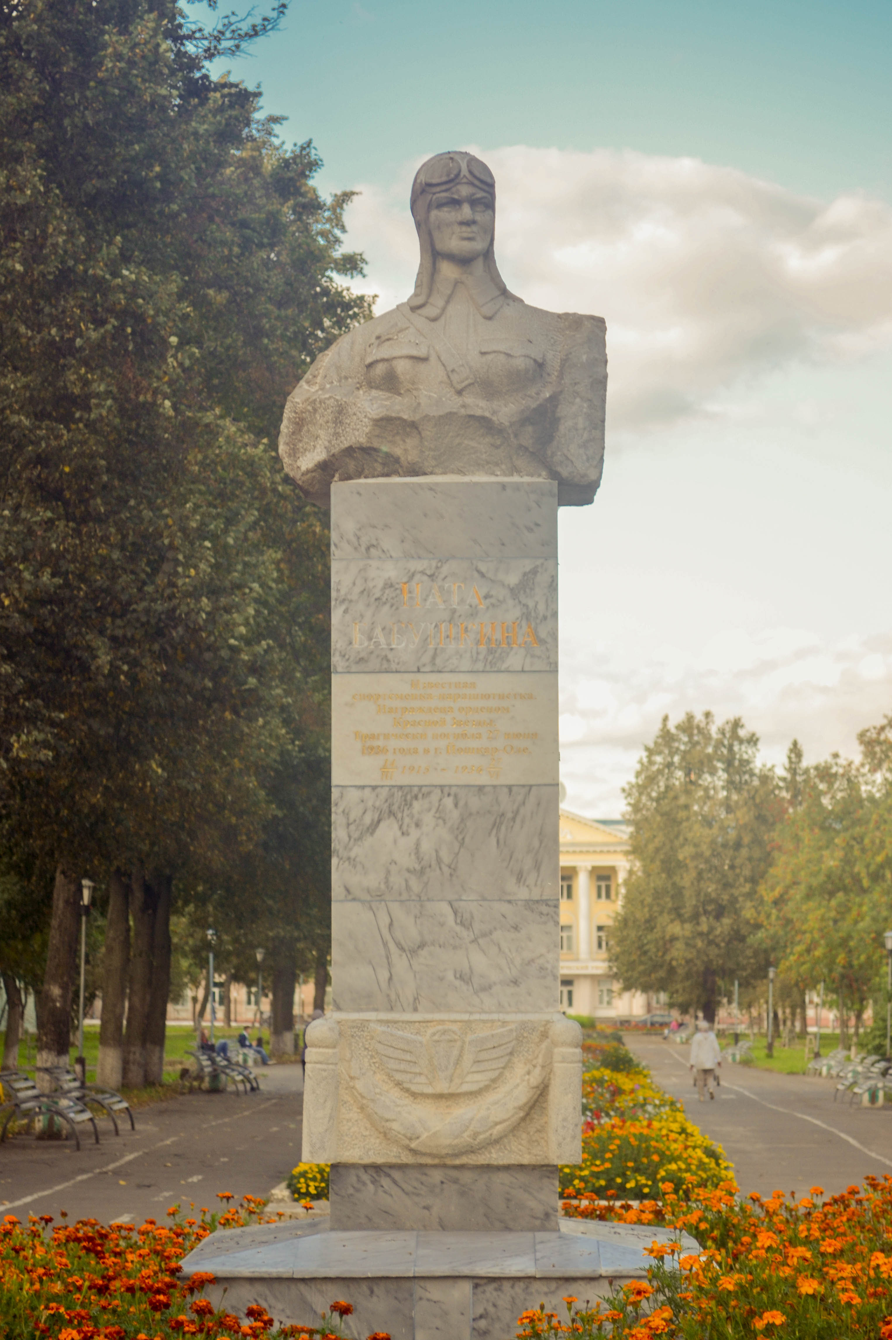 Бюст парашютистки Н. Бабушкиной: сквер им. Н. Бабушкиной, Йошкар-Ола, Марий Эл